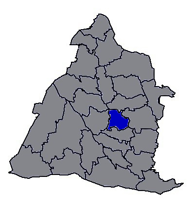 臺灣省彰化縣埔心鄉。